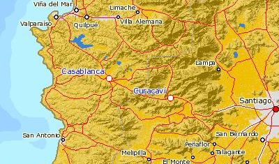 Curacaví und andere Gemeinden zwischen Santiago und Valparaíso. Topografie und Wegenetz.